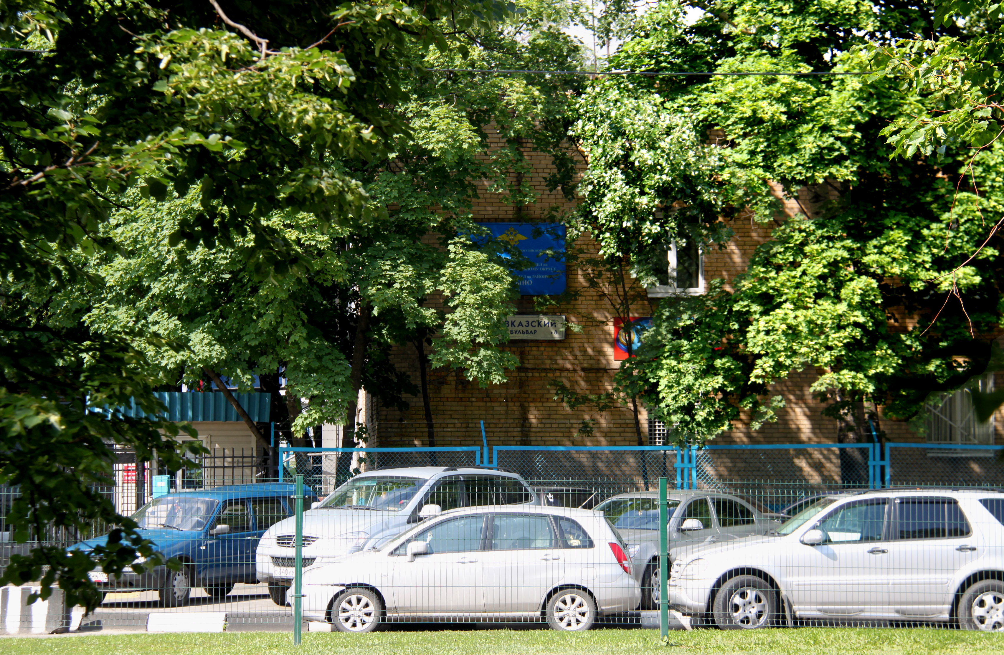 ОВД по району Царицыно города Москвы